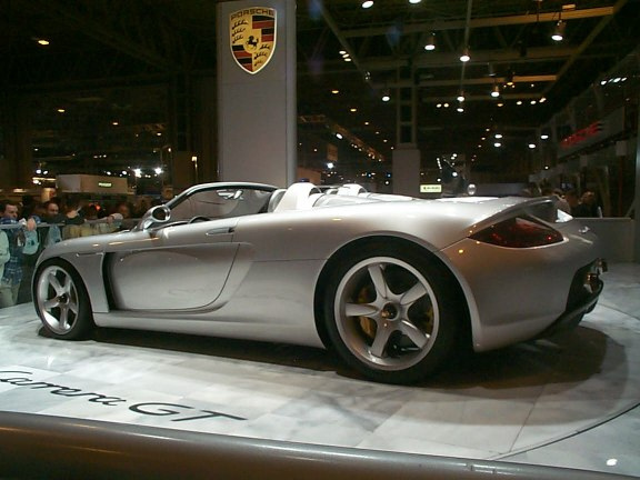 carreragt_1